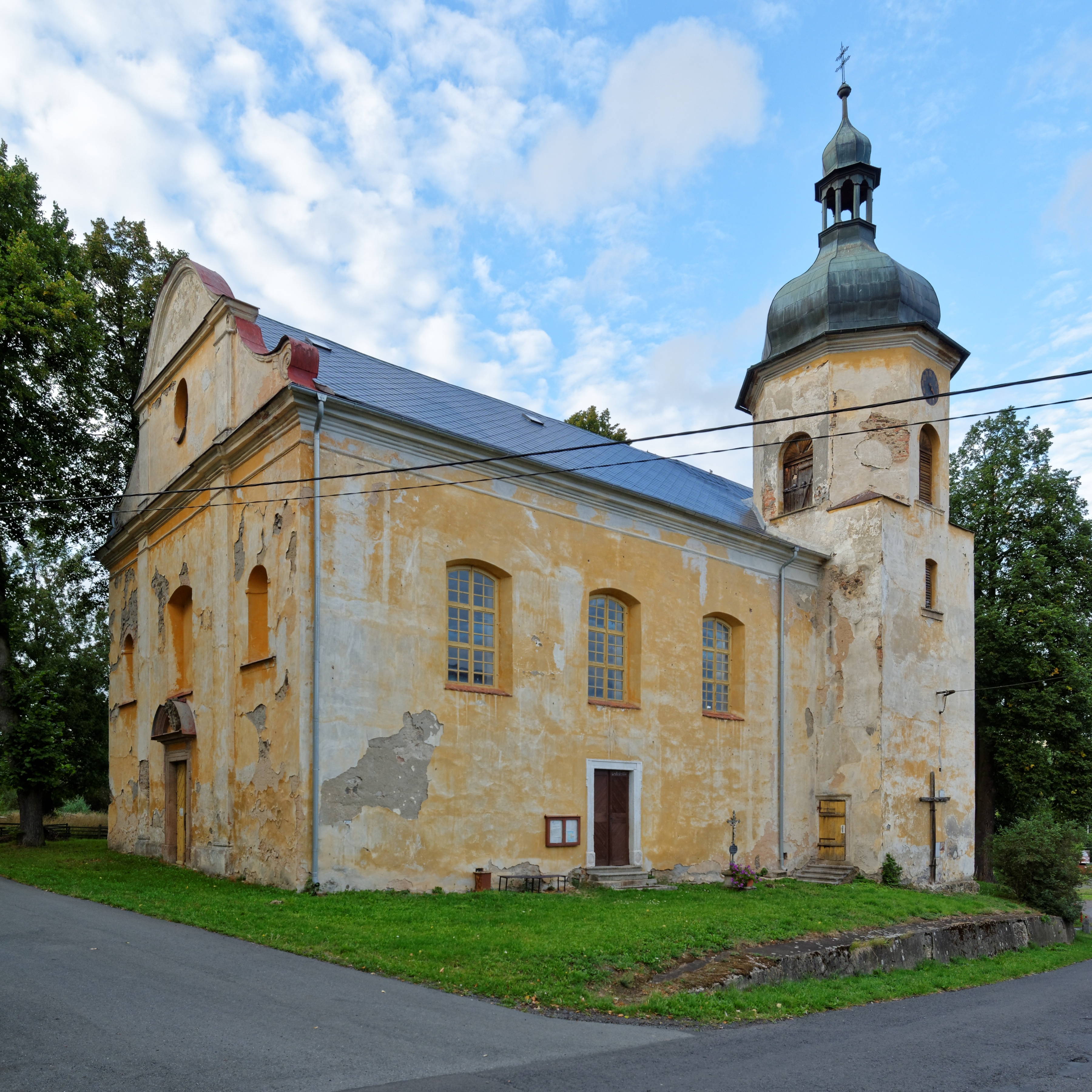 Kostel svatého Vavřince, Luka (Verušičky). Pohled od jihozápadu